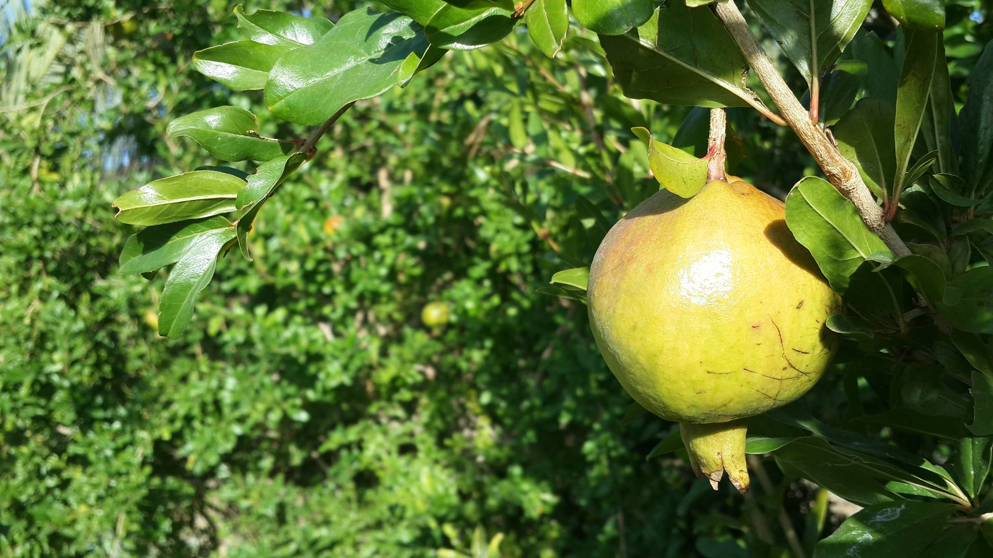 درختان انار بلوچستان